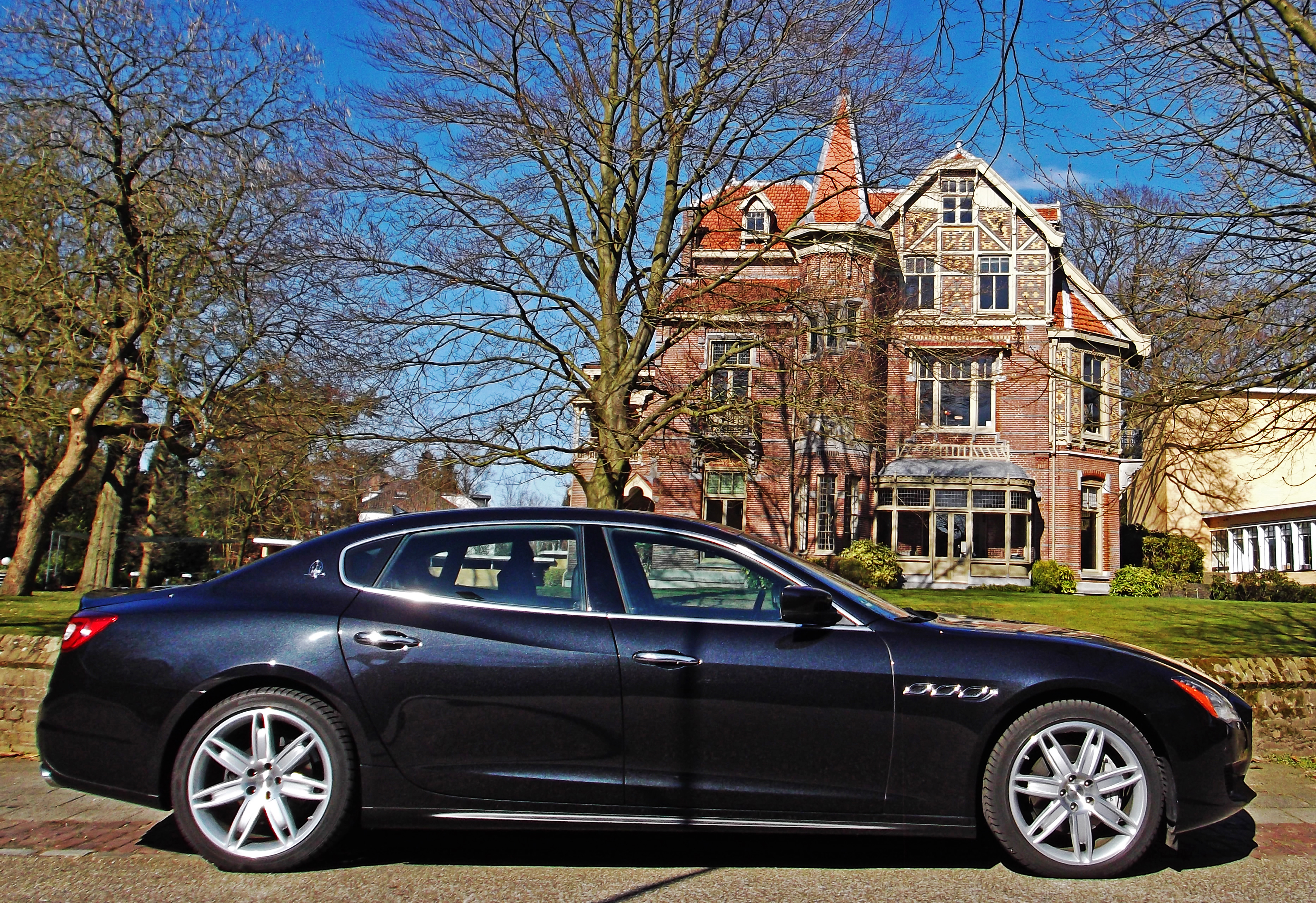 German license plate.